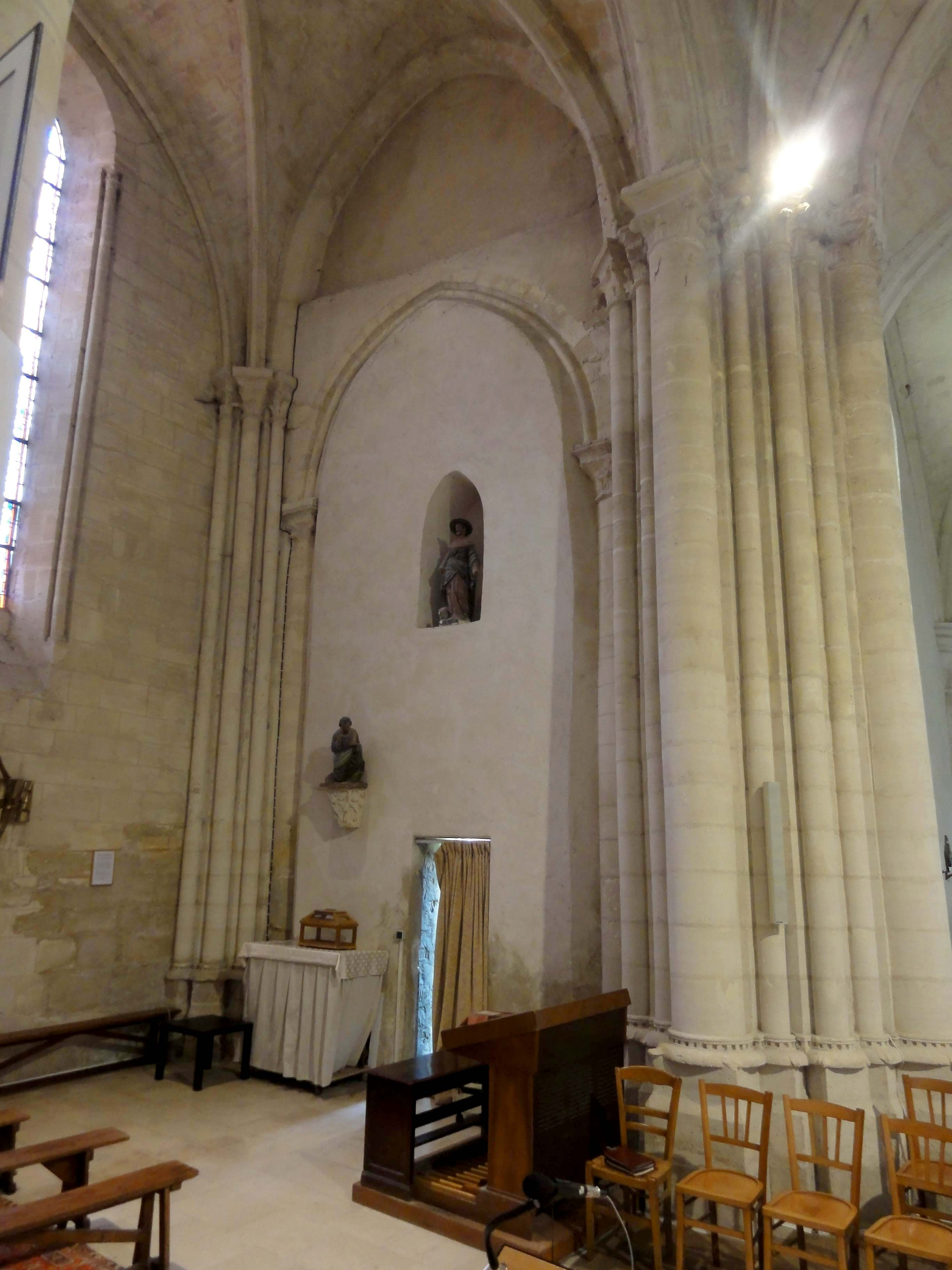 Intérieur de l'église - voir titre.